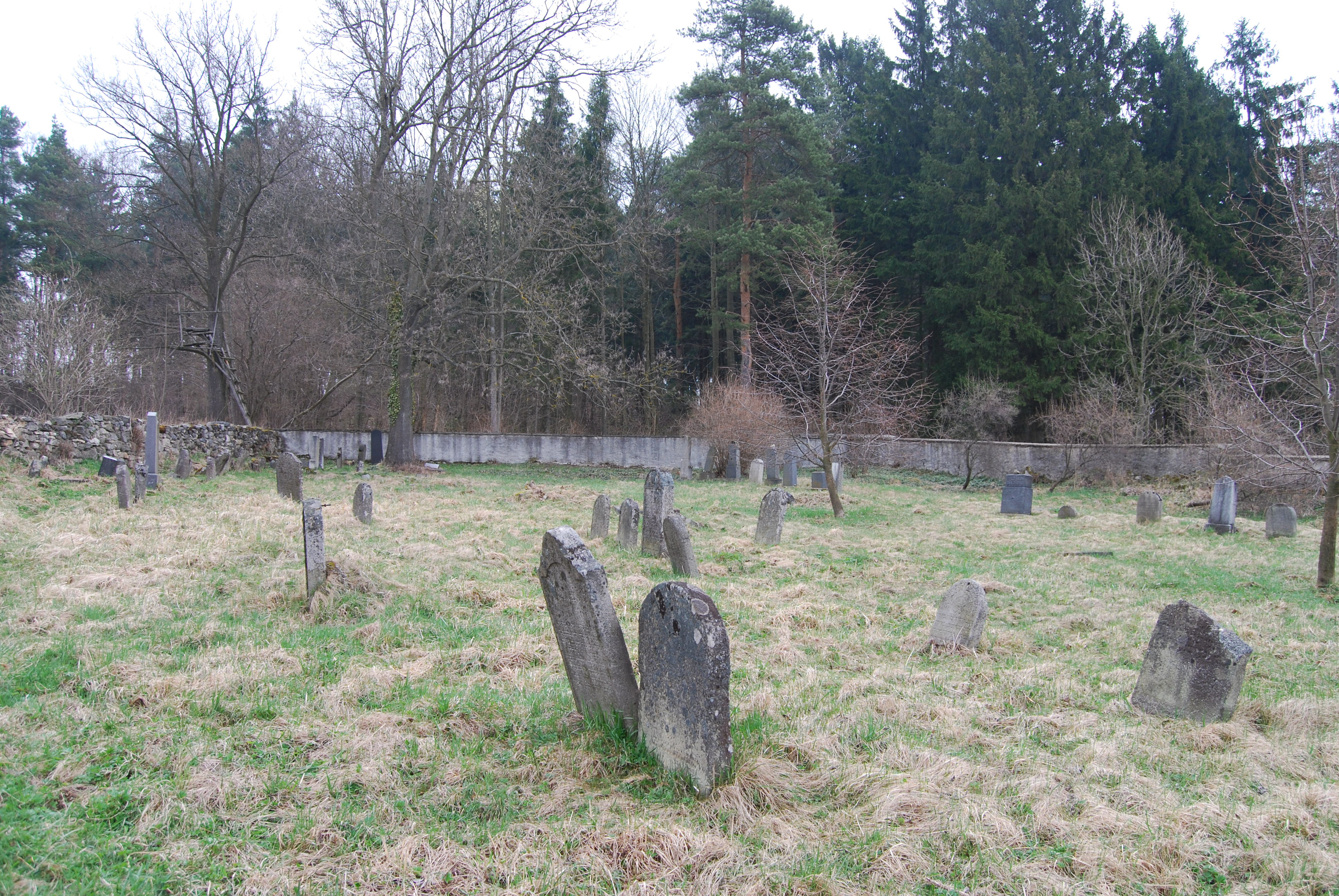 Jednotlivé náhrobky. Židovský hřbitov v Květuši. Květuš je vesnice, část obce Chyšky v okrese Písek. Česká republika.